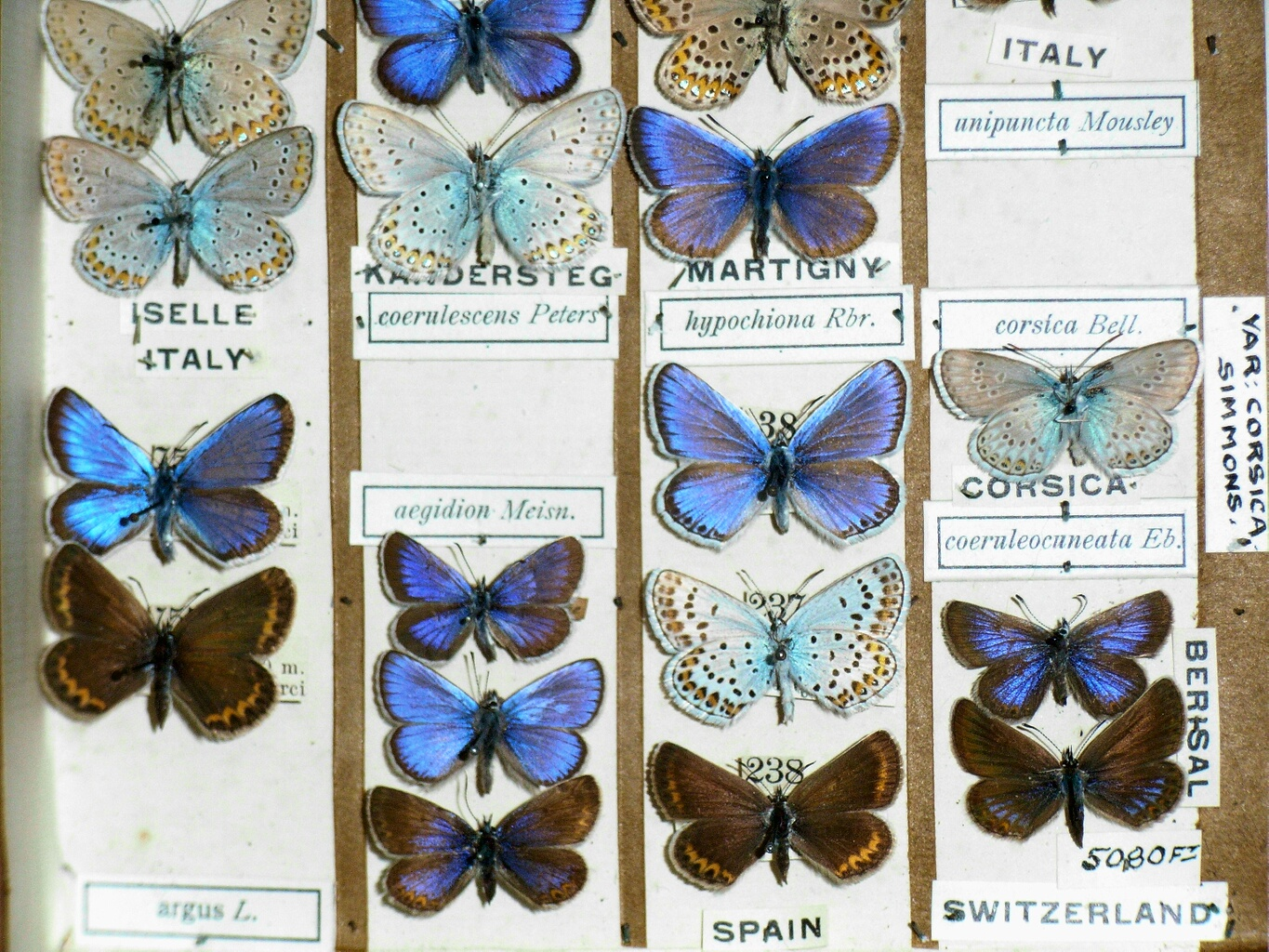 Plebejus argus